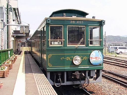 三陸鉄道 36-401